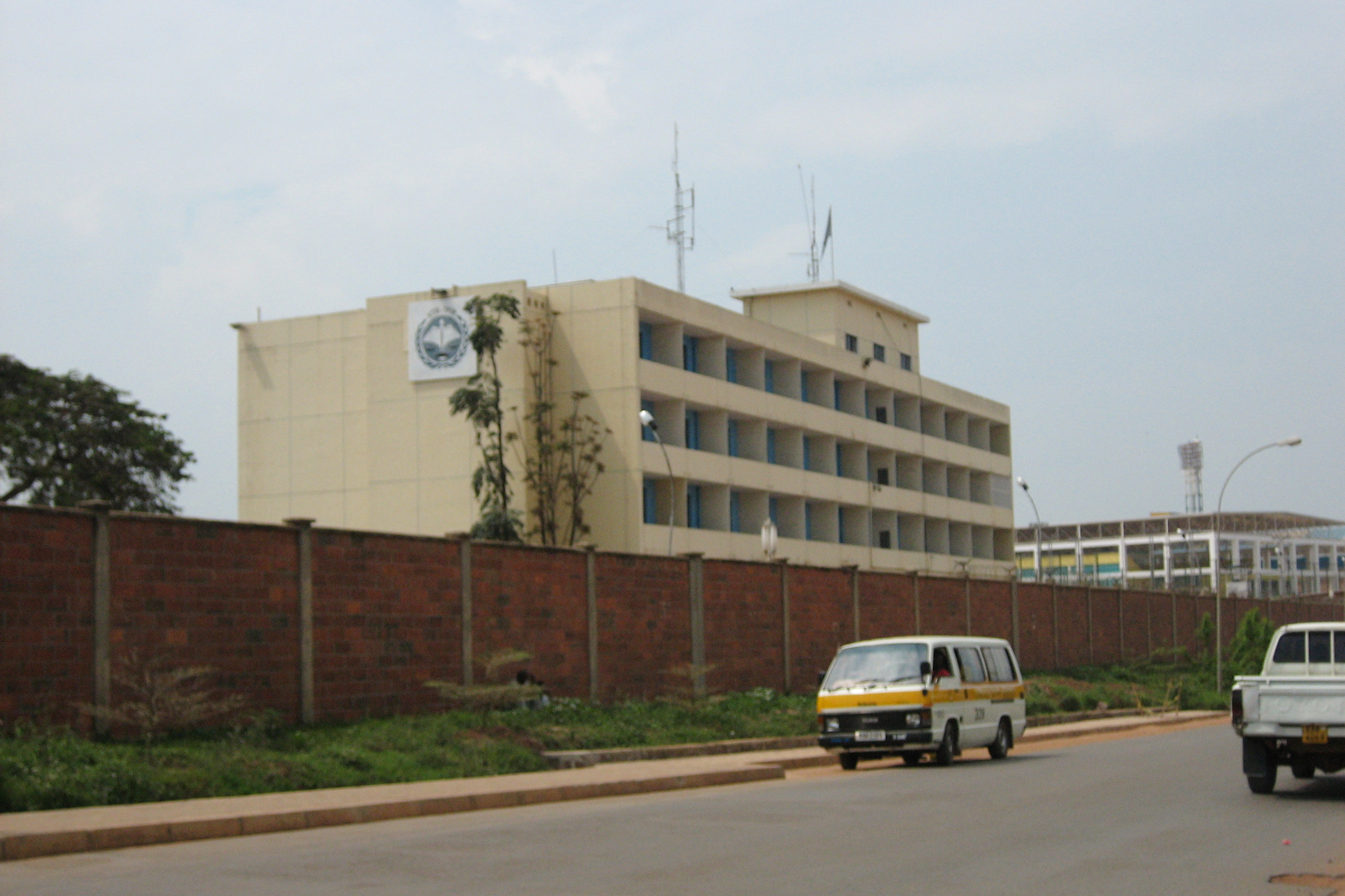 ICTR building in Kigali, Rwanda